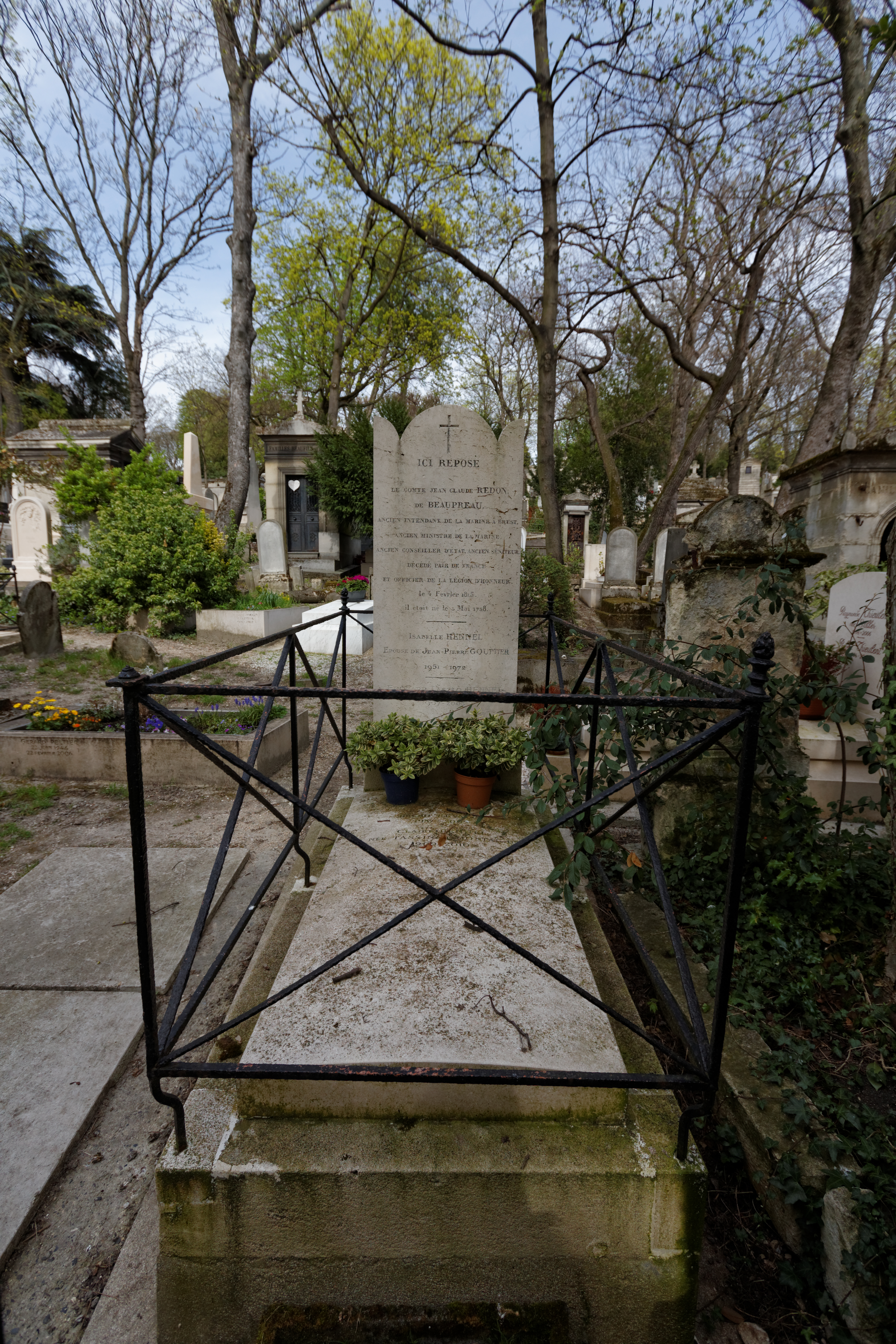 Vue d'ensemble